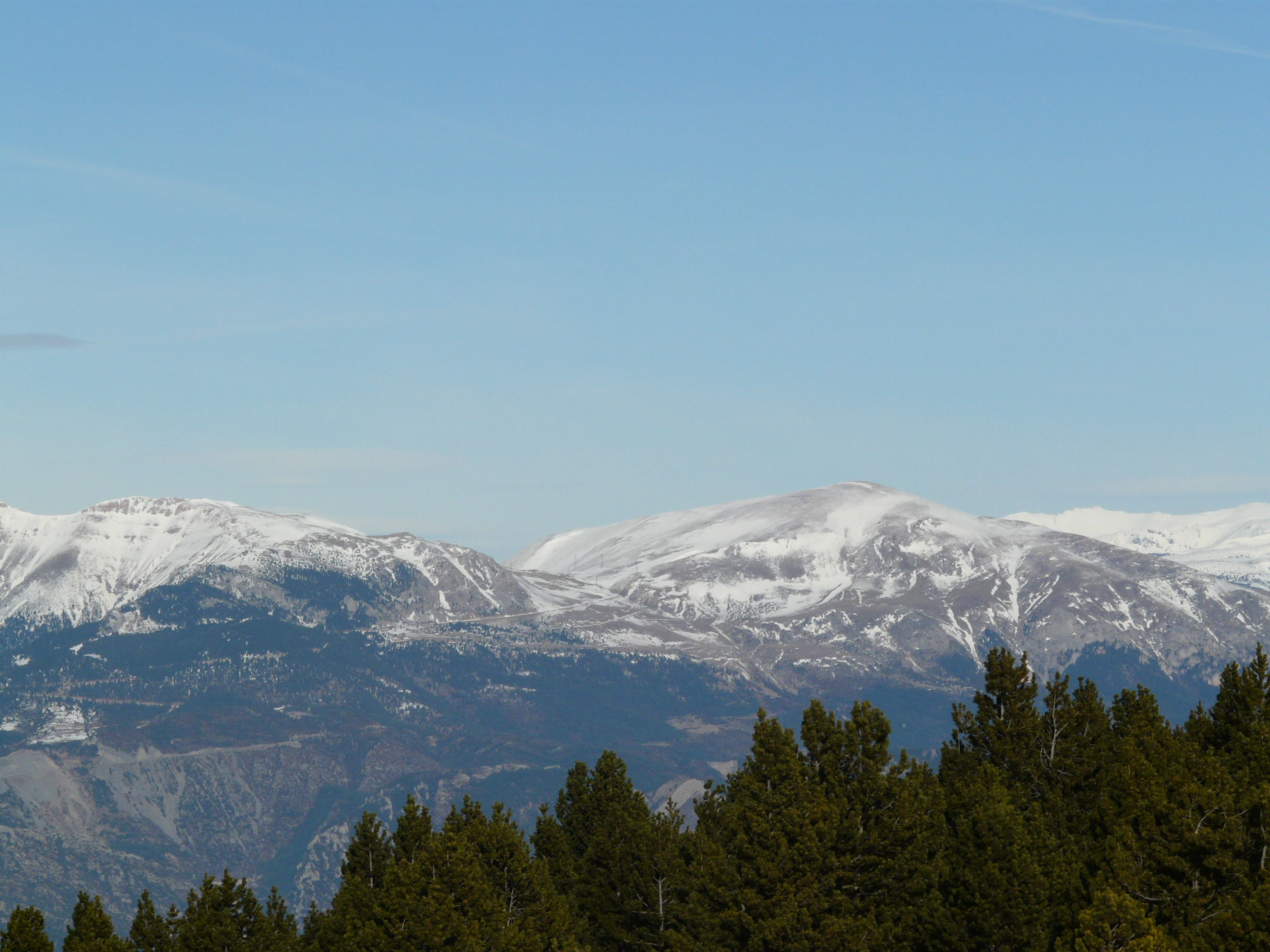 Puigllançada (Berguedà) (Bagà). Serra de Moixeró. This is a a photo of an emblematic summit in Catalonia, Spain, with id: CE-283082006